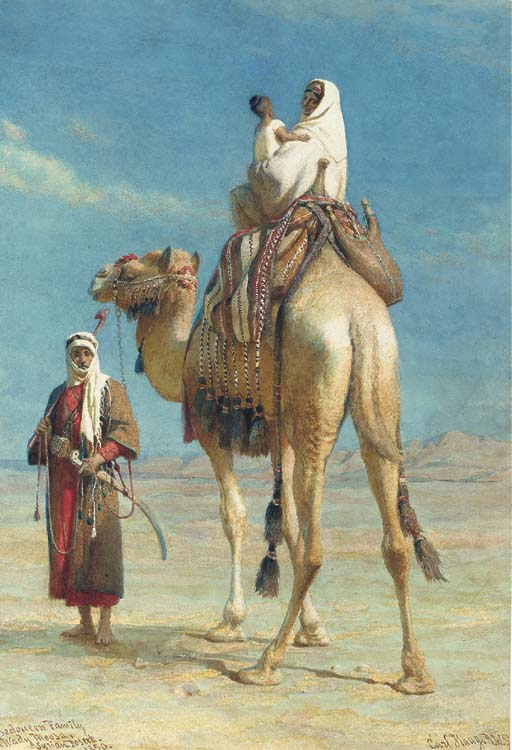 A Bedouin family in the Wadi Mousa, Syrian Desert. Watercolour on paper. 50.1 x 34.9 cm.